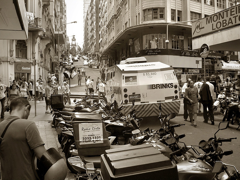 Antiga rua da Ladeira, hoje Marechal Câmara, centro de Porto Alegre, Brasil.